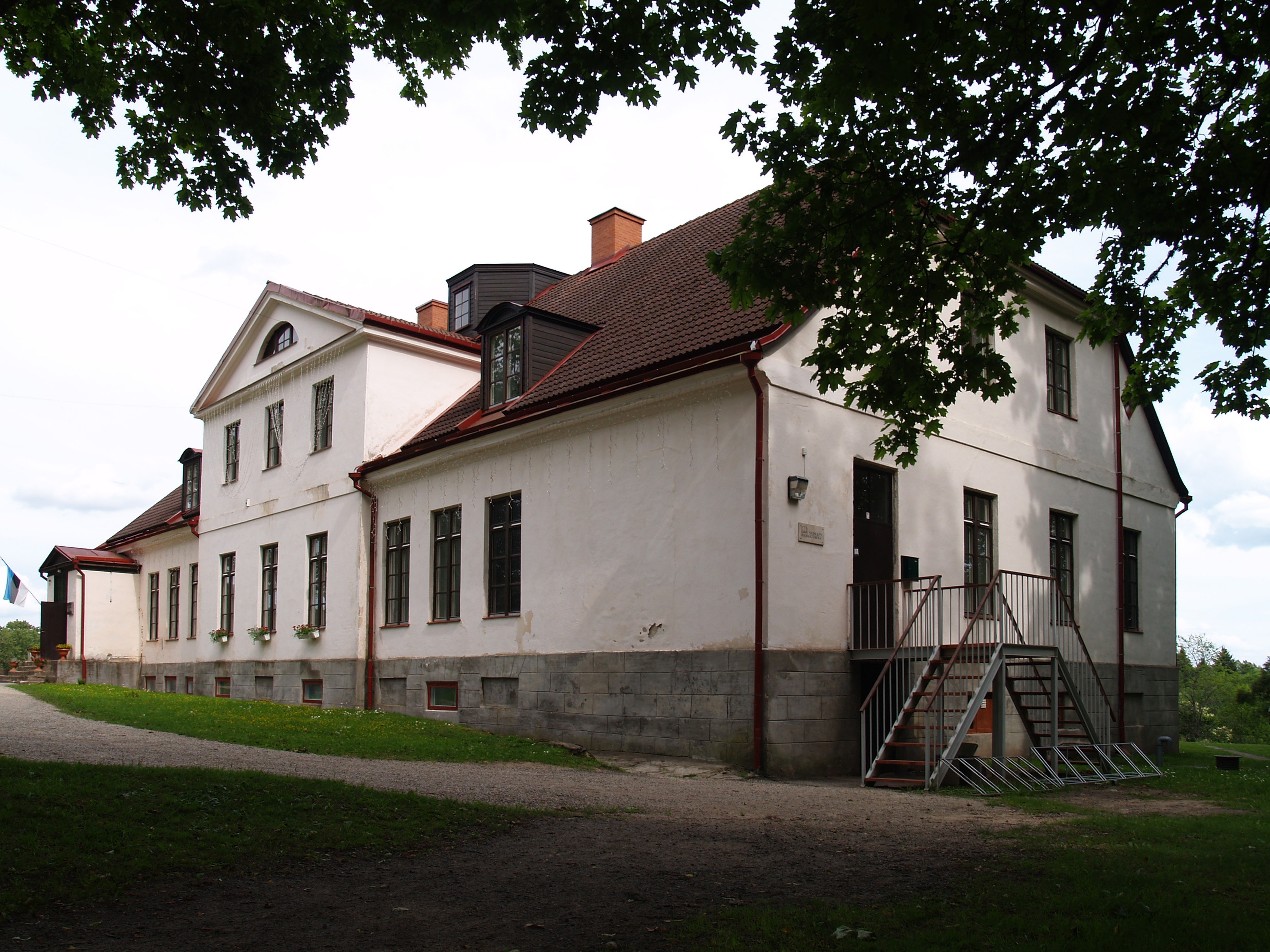 Uue-Suislepa mõisa peahoone